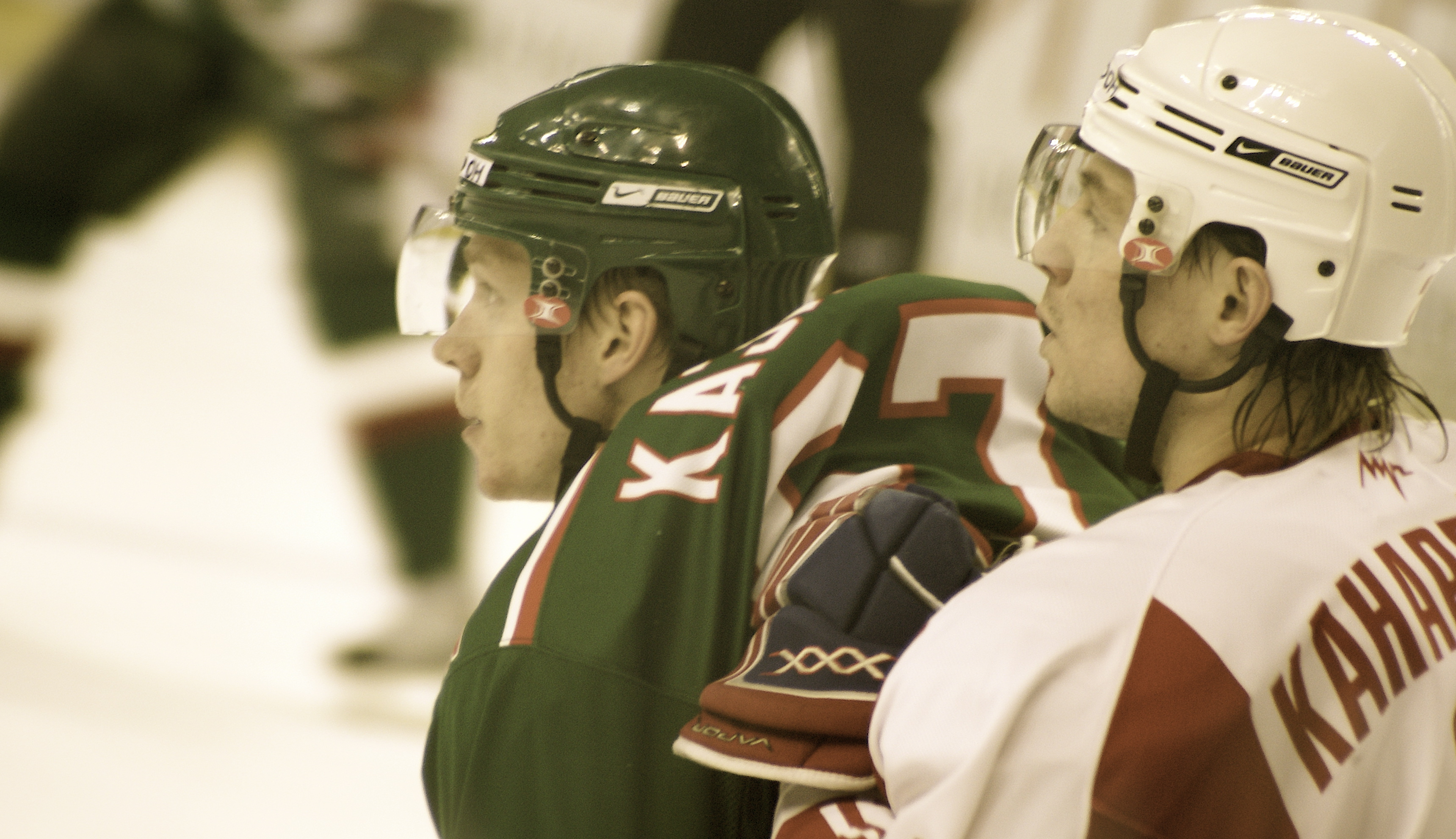 Дмитрий Казионов, AK Bars Kasan and КАНАРЕЙКИН Леонид of HK Spartak Moscow